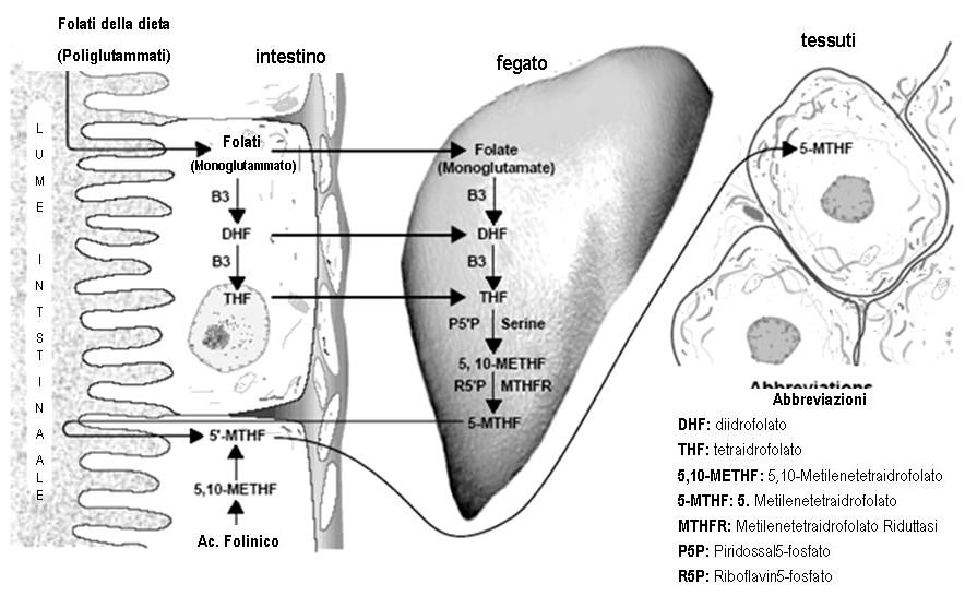 Sintesi delle forme attive dell’Ac. Folico e assorbimento intestinale.